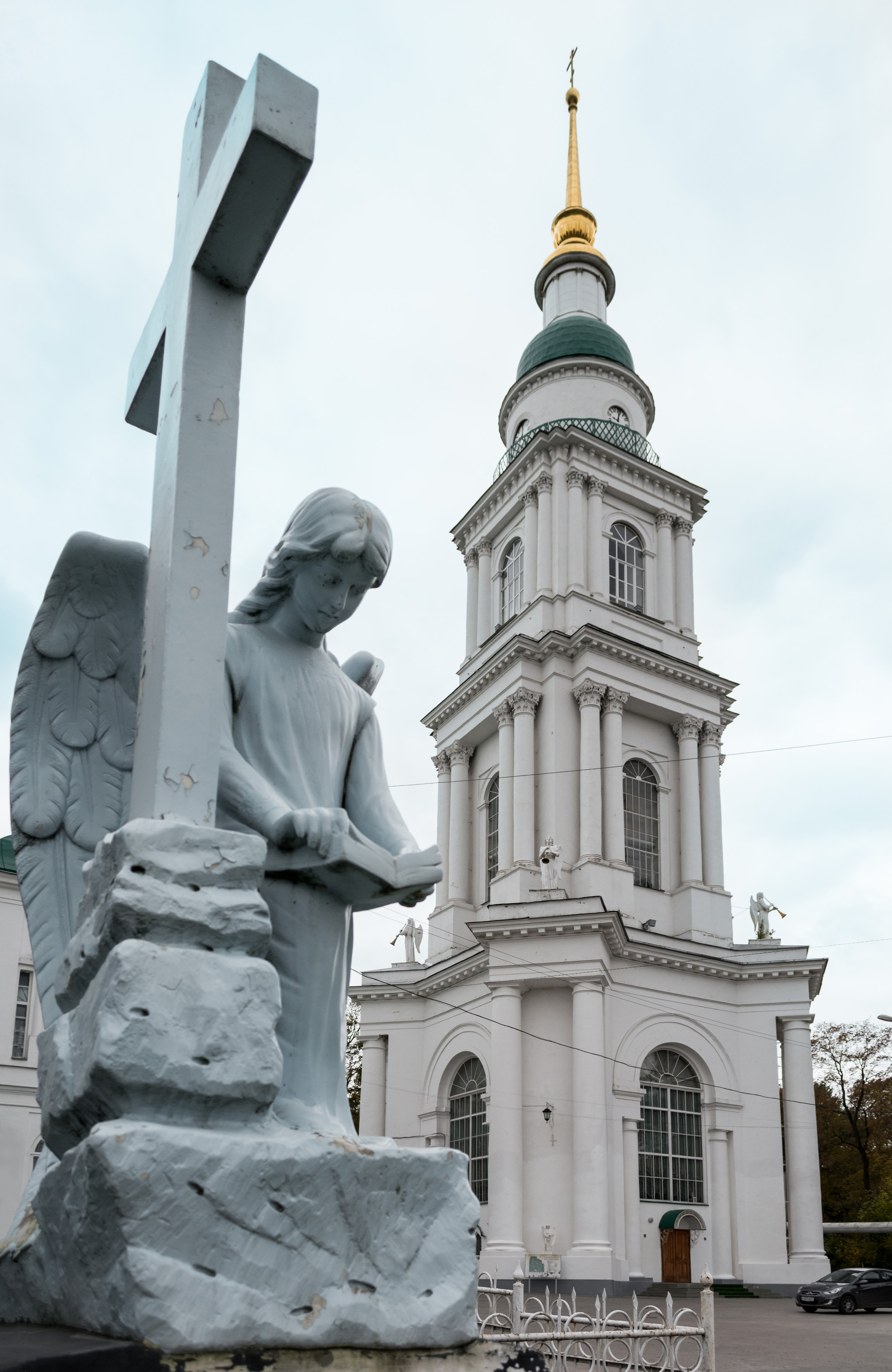 Надгробие с Ангелом (Тульская область, Тула, Всесвятское кладбище)